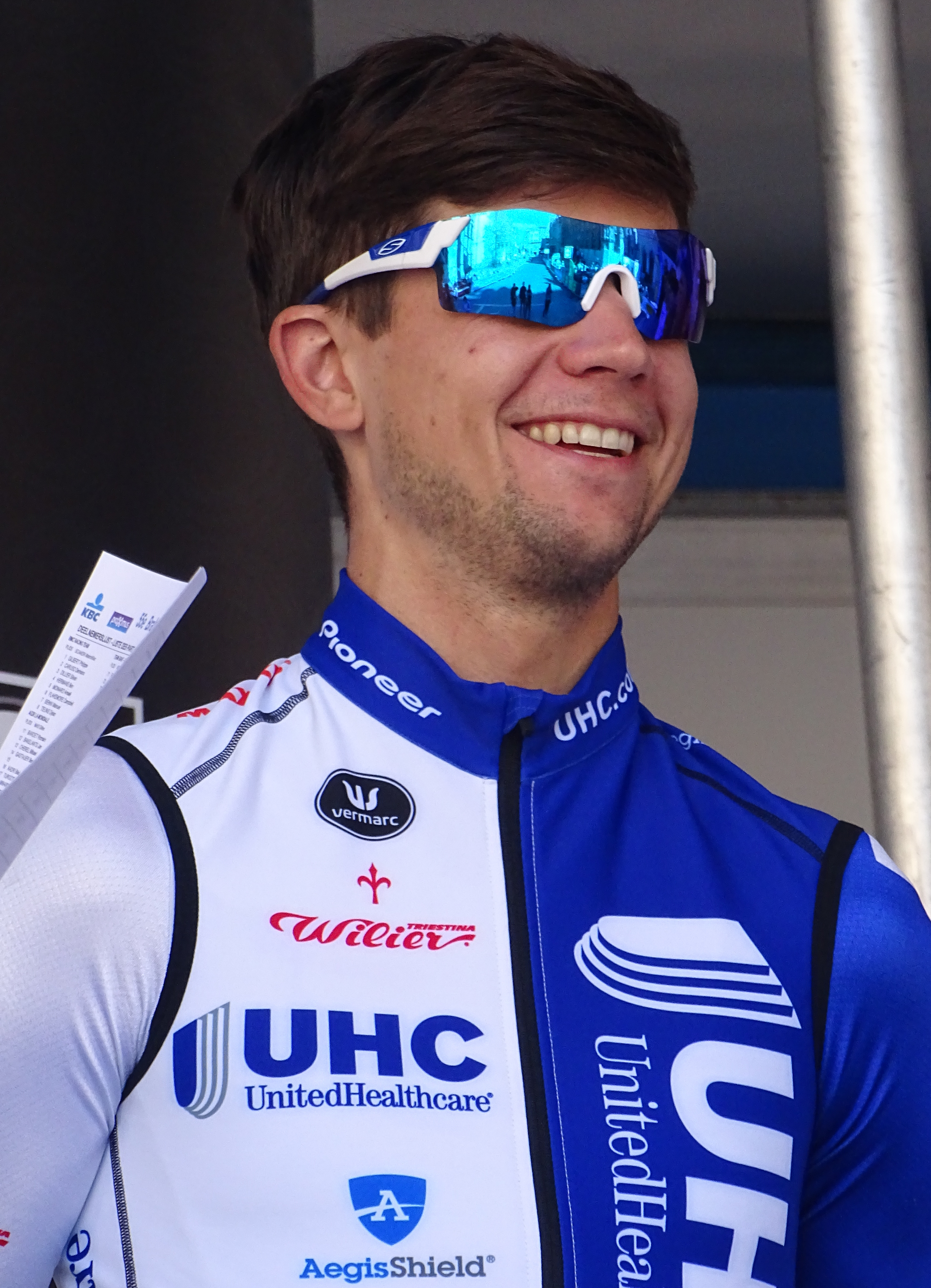 Reportage réalisé le mercredi 15 avril à l'occasion du départ de la Flèche brabançonne 2015 à Louvain, Belgique.